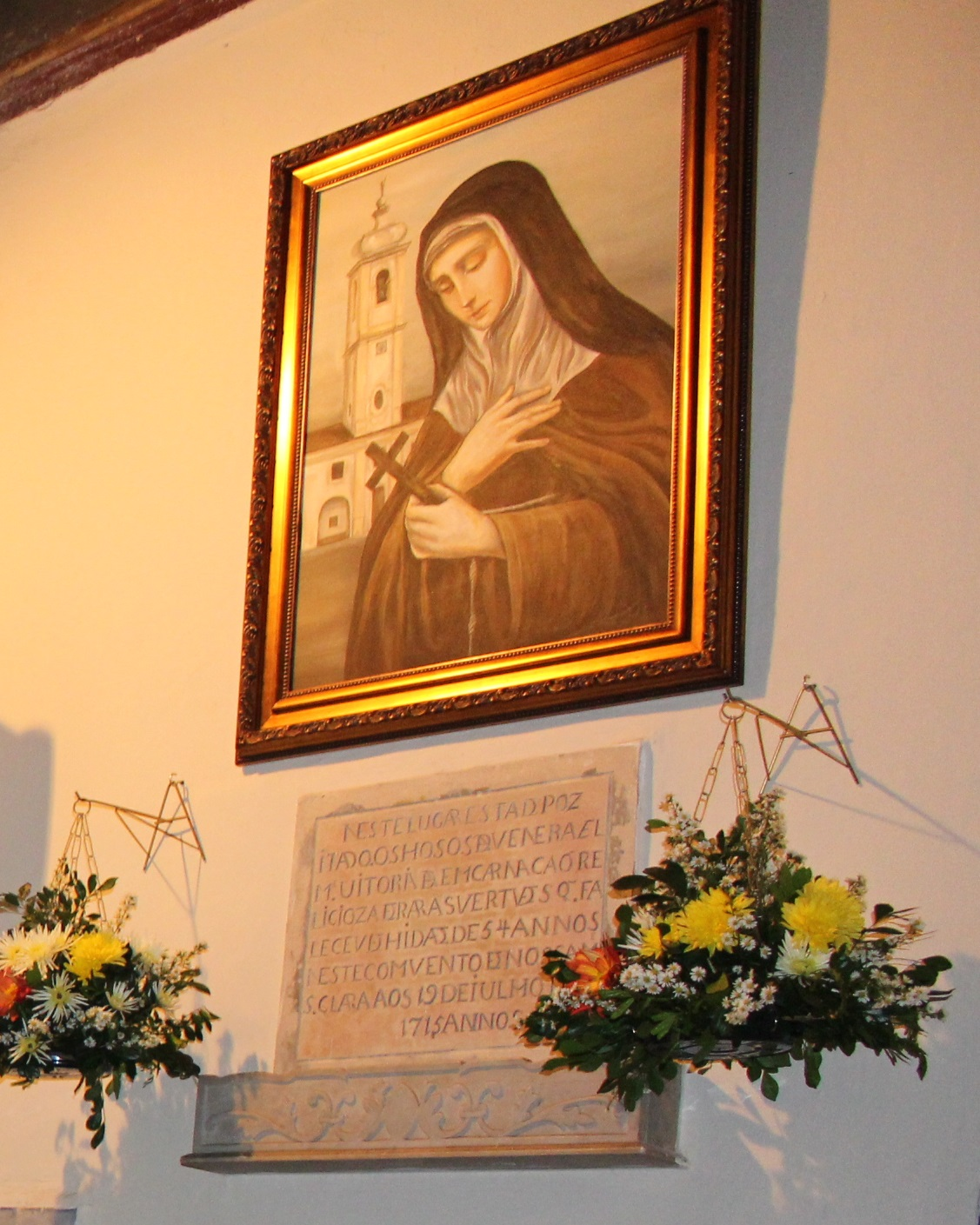 Local onde estão as relíquias da Madre Vitória no Convento do Desterro em Salvador-BA